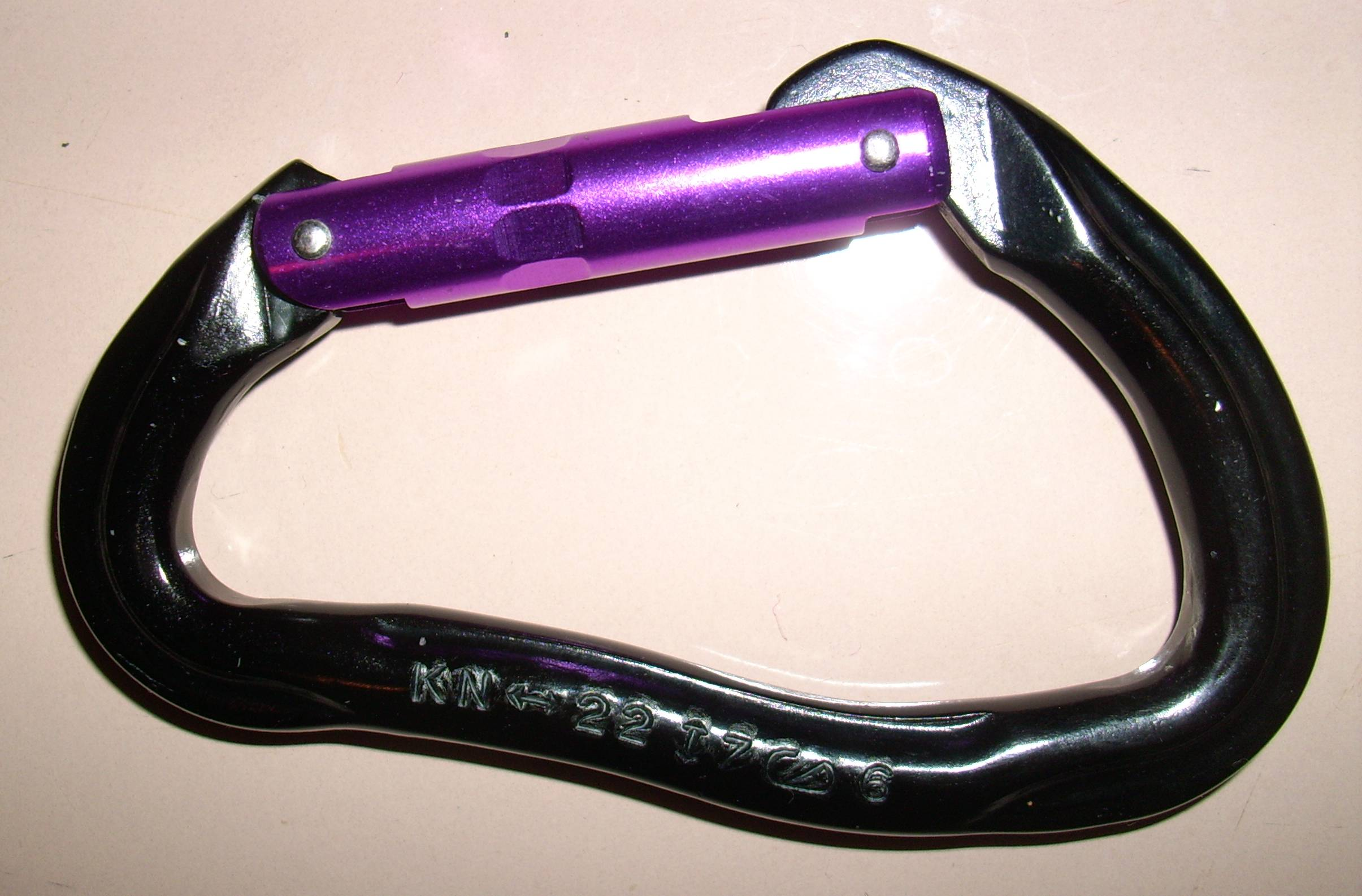 Normalkarabiner, Bruchlast längs 2200 daN, quer 700 daN, offen 600 daN.